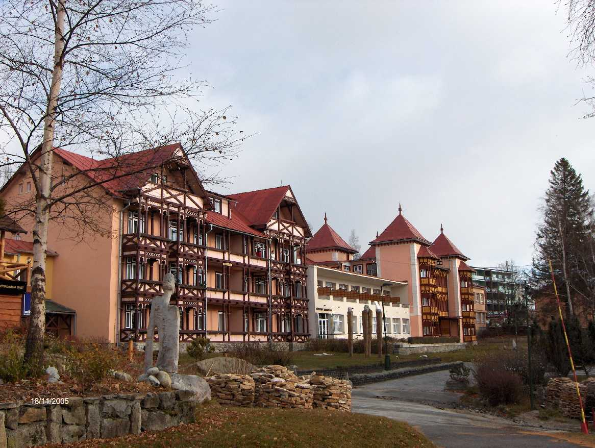 Kategória:Obrázky budov